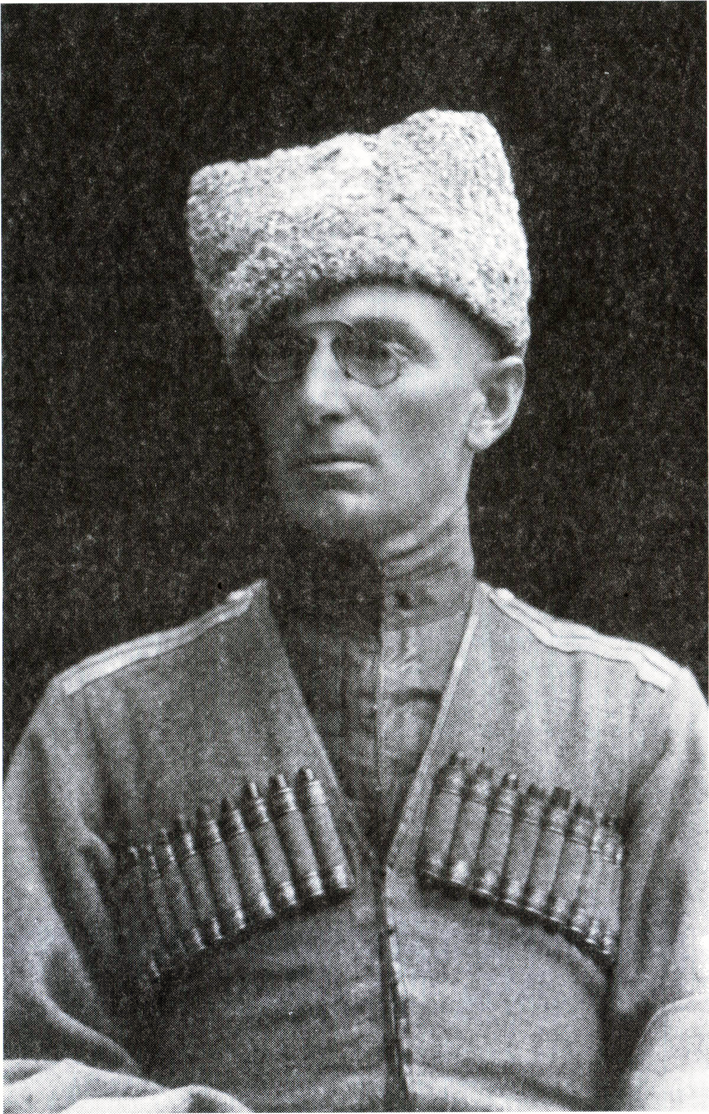 Полковник Михаил Гордеевич Дроздовский